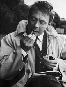 Skådespelaren Allan Edwall i mitten på 1960-talet